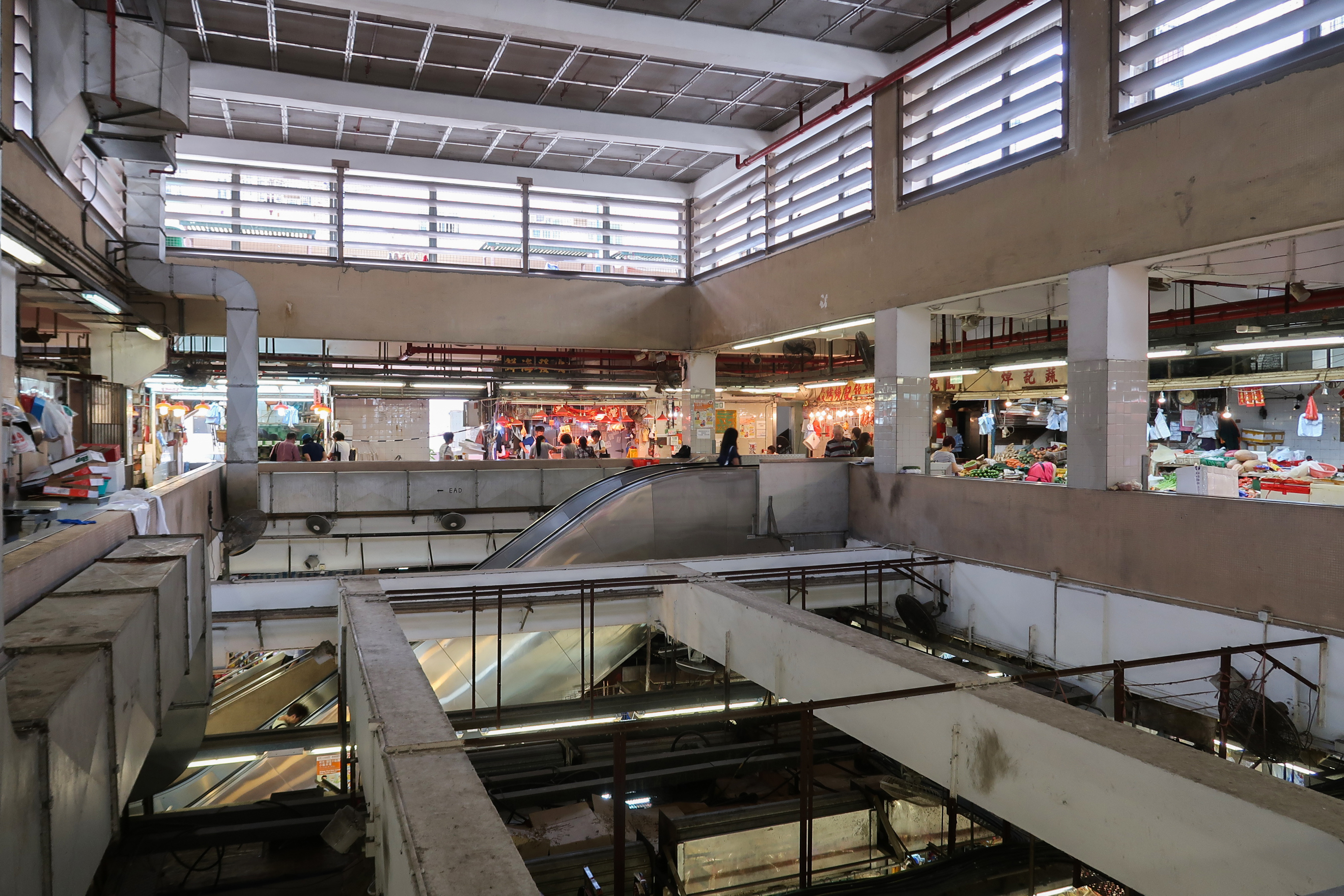 Tsuen Wan Market Atrium